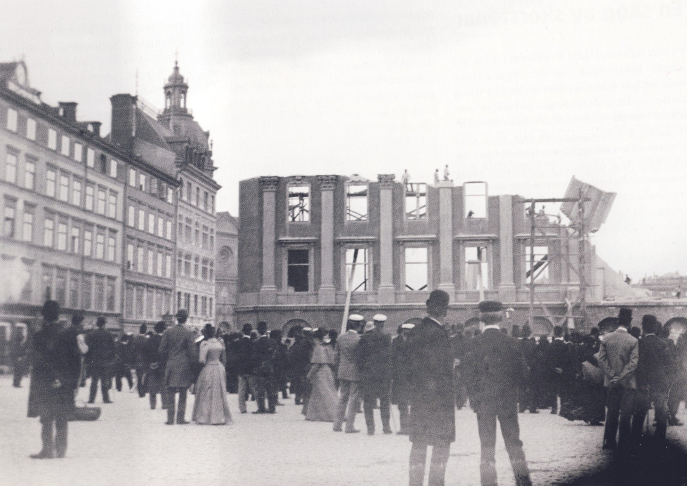 Rivningen av Gustavianska operan i Stockholm